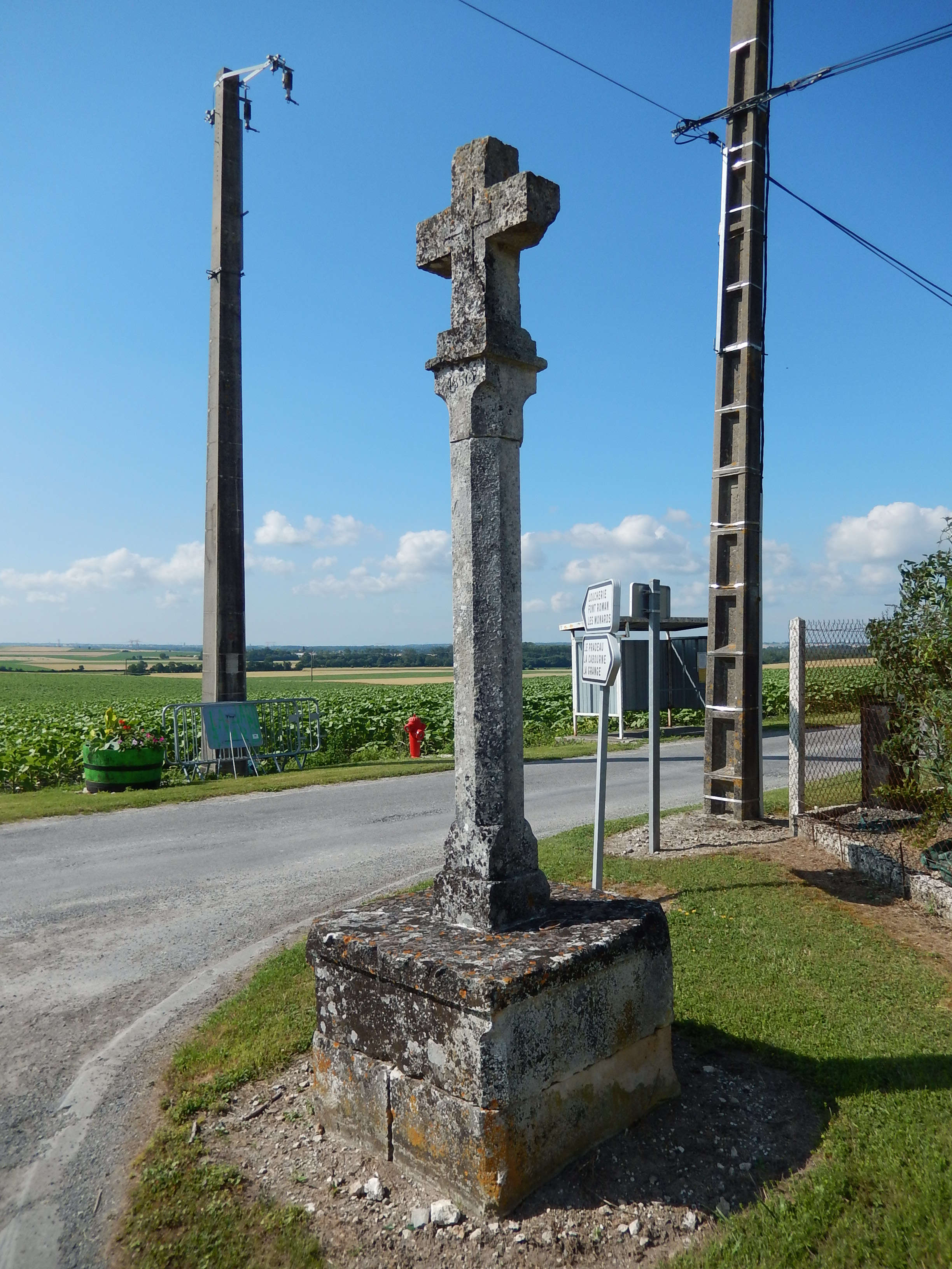 Une croix située dans un écart du village de La Jard (Charente-Maritime, France).